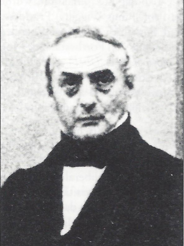 Lithographie von Christian Wilbrandt